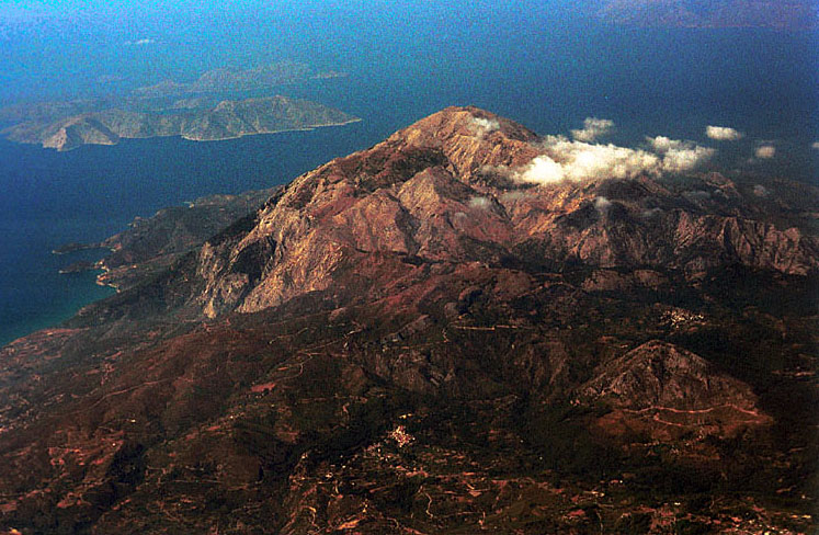 Luftbildaufnahme von Gebirgsmassiv des Kerketéas im Westen von Sámos